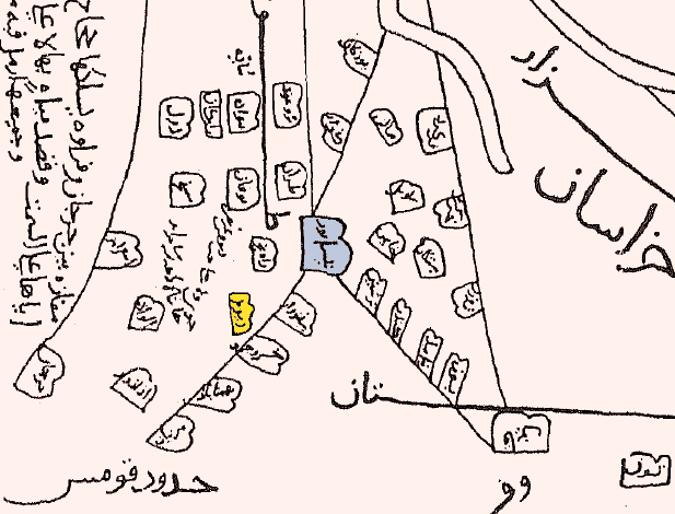 قریه یا شهر ریوند، مرکز ربع ریوند نیشابور در بخشی از نقشه خراسان ترسیم شده توسط ابن حوقل در تاب صورةالارض